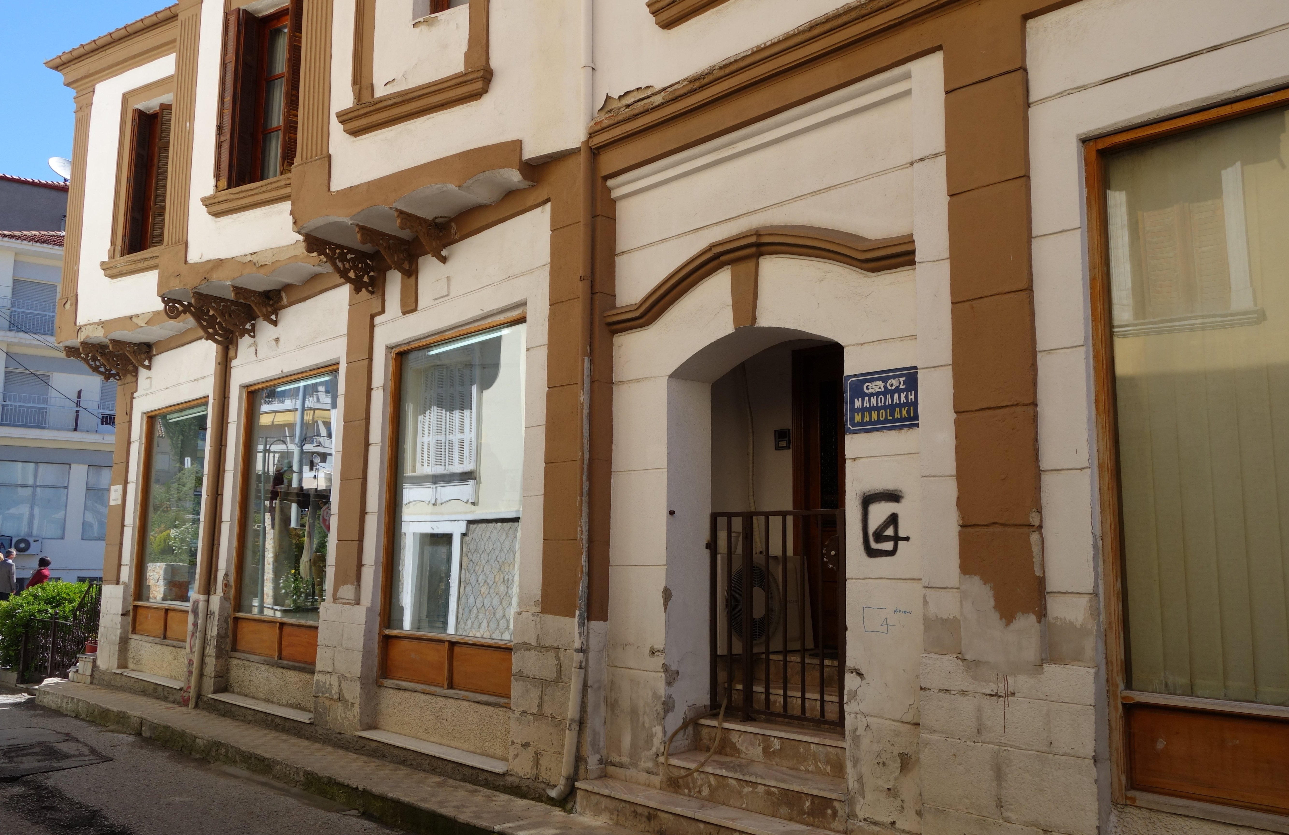 Kürschner in der Stadt Kastoria, Griechenland. Siehe auch Kürschner in der Präfektur Kastoria und Kürschner in der Stadt Siatista.